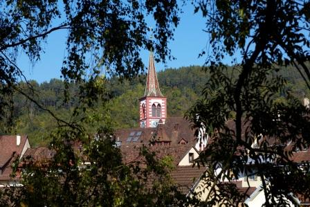 Stadtkirche Liestal Quelle: Informationsdienst Stat Liestal